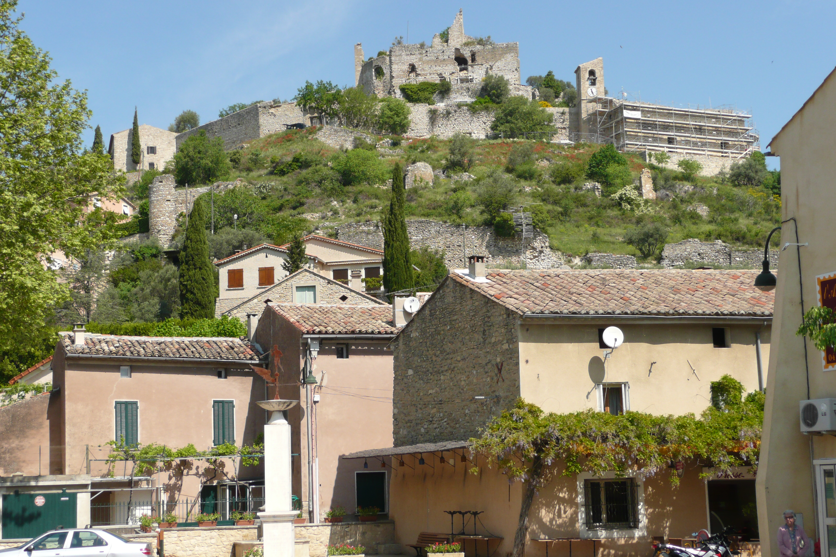 Place à Entrechaux.